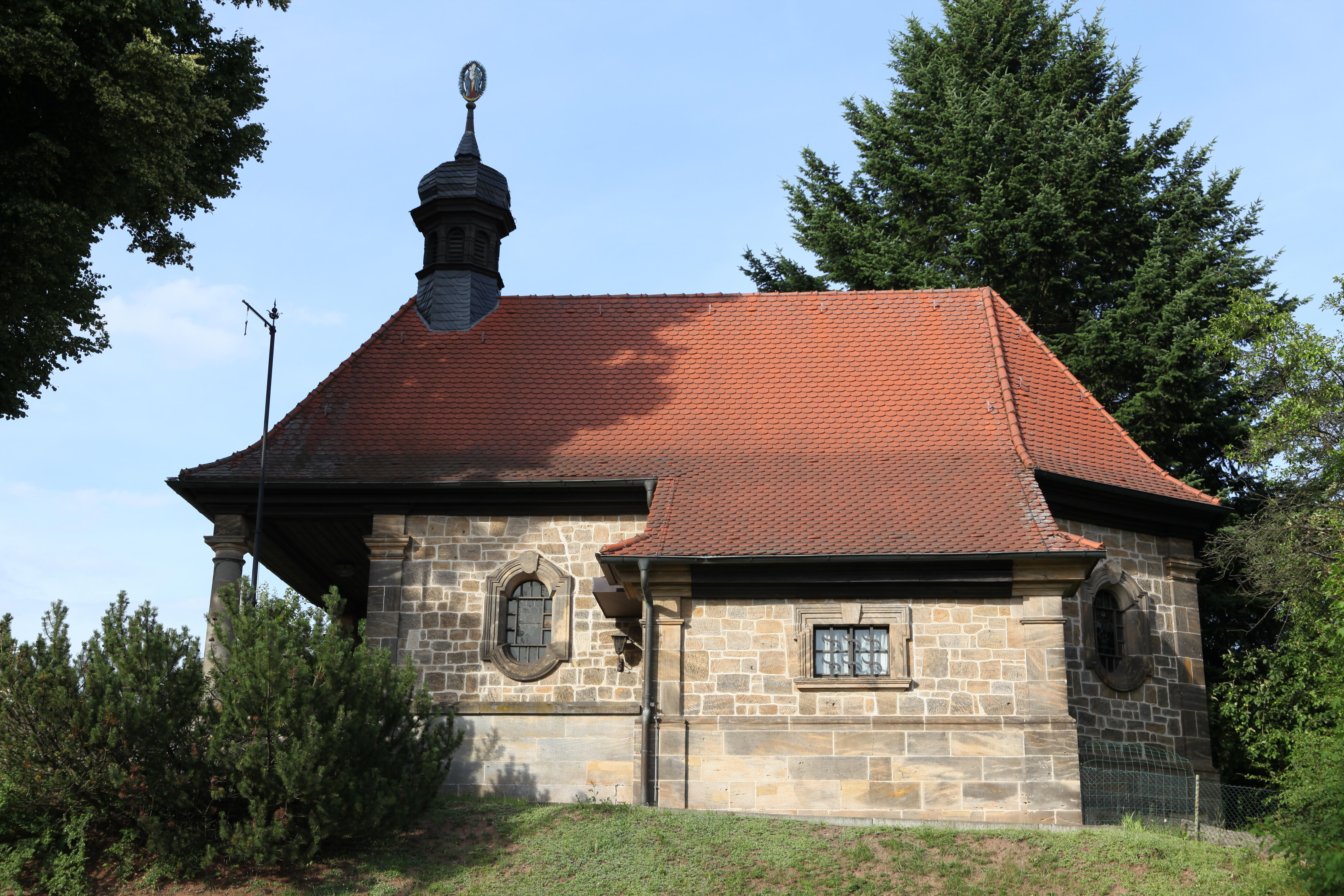 Katholische Kapelle in Pfaffendorf, OT von Maroldsweisach, Bayern